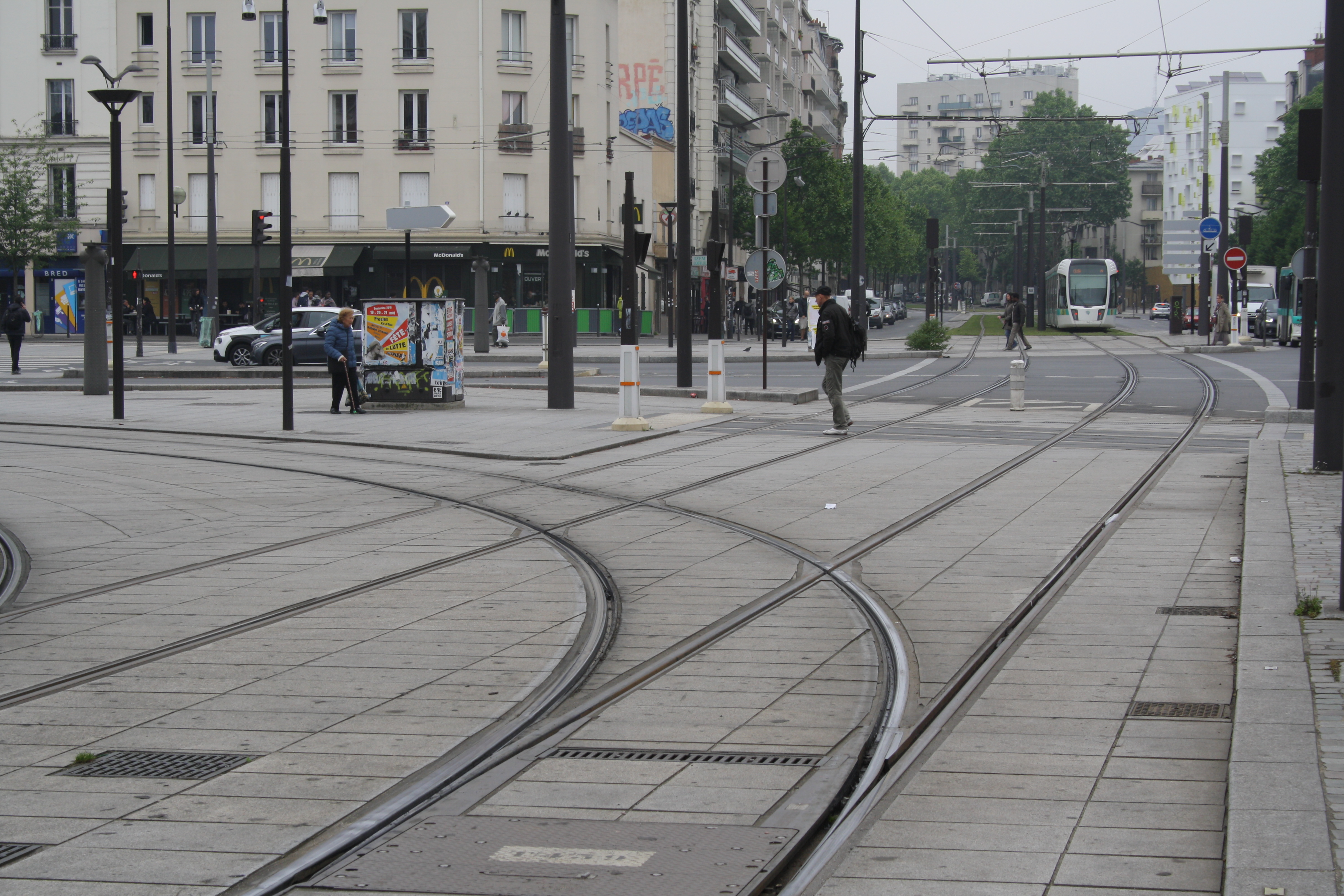 Verknüpfung der Pariser Straßenbahnlinien 3a und 3b vor der Station Porte de Vincennes